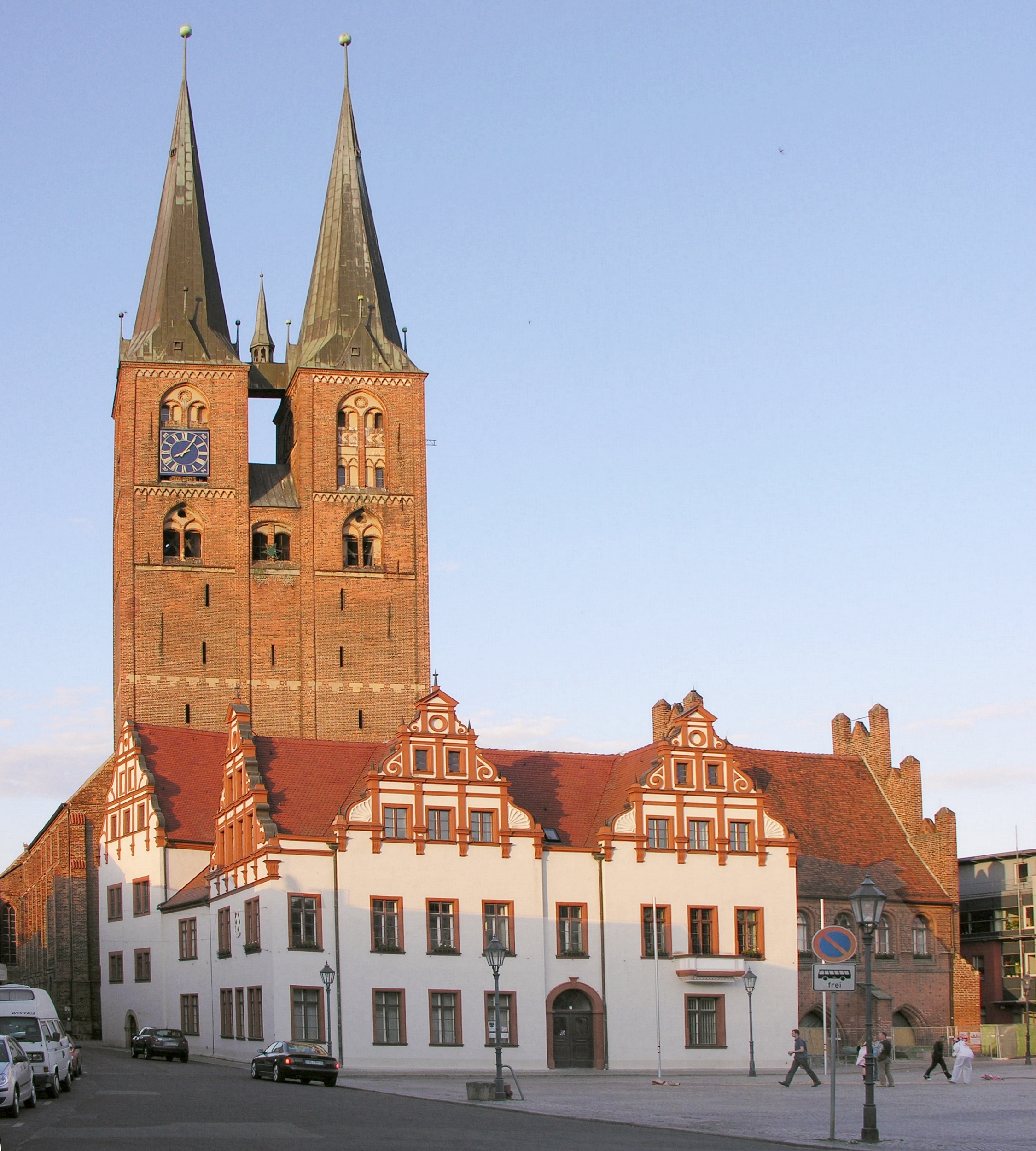 Stendal Rathaus zurückgehend auf das 15 Jahrhundert (spätere Änderungen zum Renaissancestil) Ensemble aus Gerichtslaube Gewandhaus und Corpsfügel, dahinter die Pfarrkirche St. - Marien Foto Wolfgang Pehlemann DSCN2455